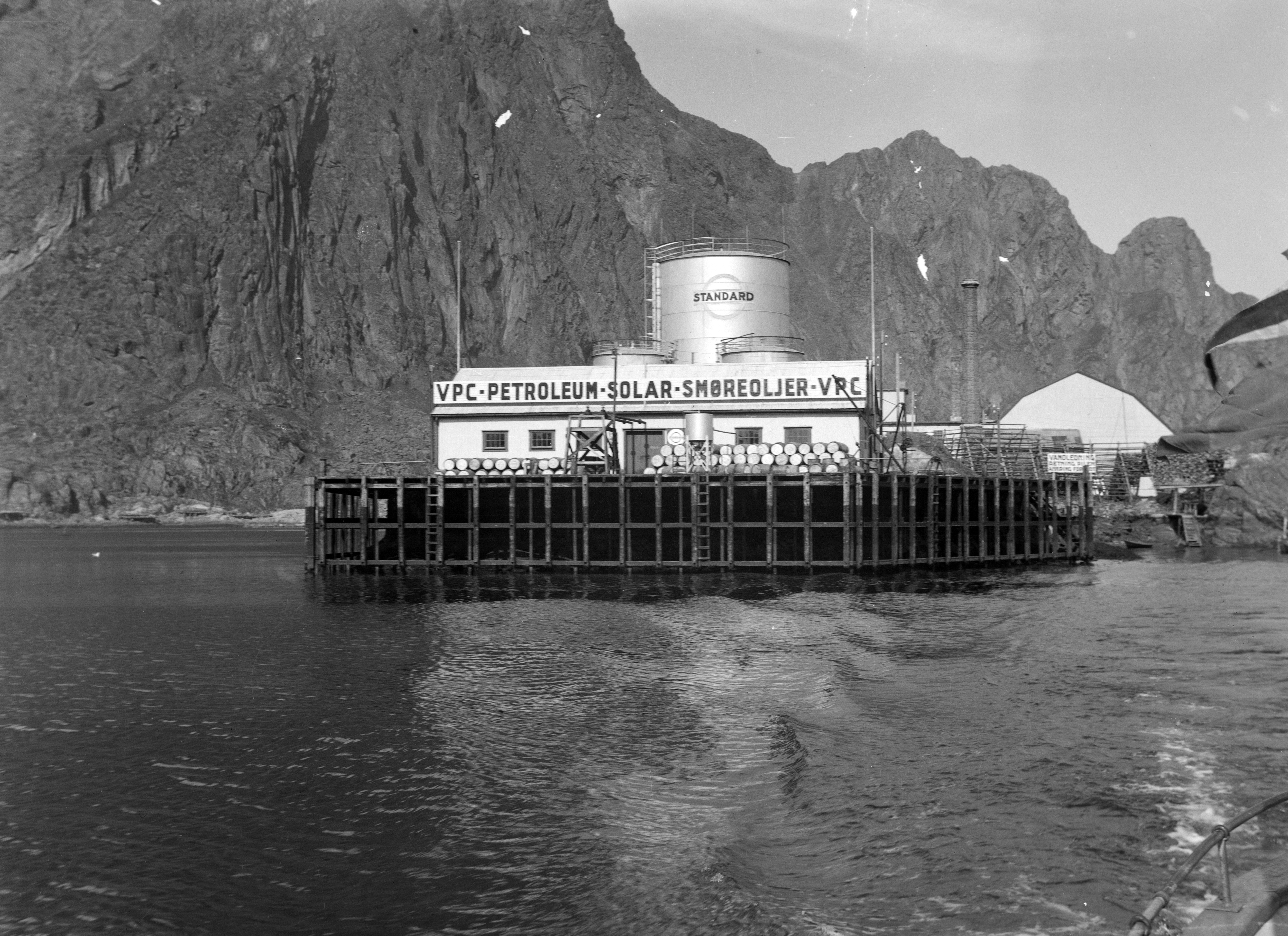 Bildet er hentet fra Nordlandsmuseet bildesamling etter Kanstad. Motivbeskrivelse: Svolvær? VPC Petroleum-Solar-Smøreoljer VPC Nøkkelord: Topografi og geologi Olje- og gasskilder Varmekraft